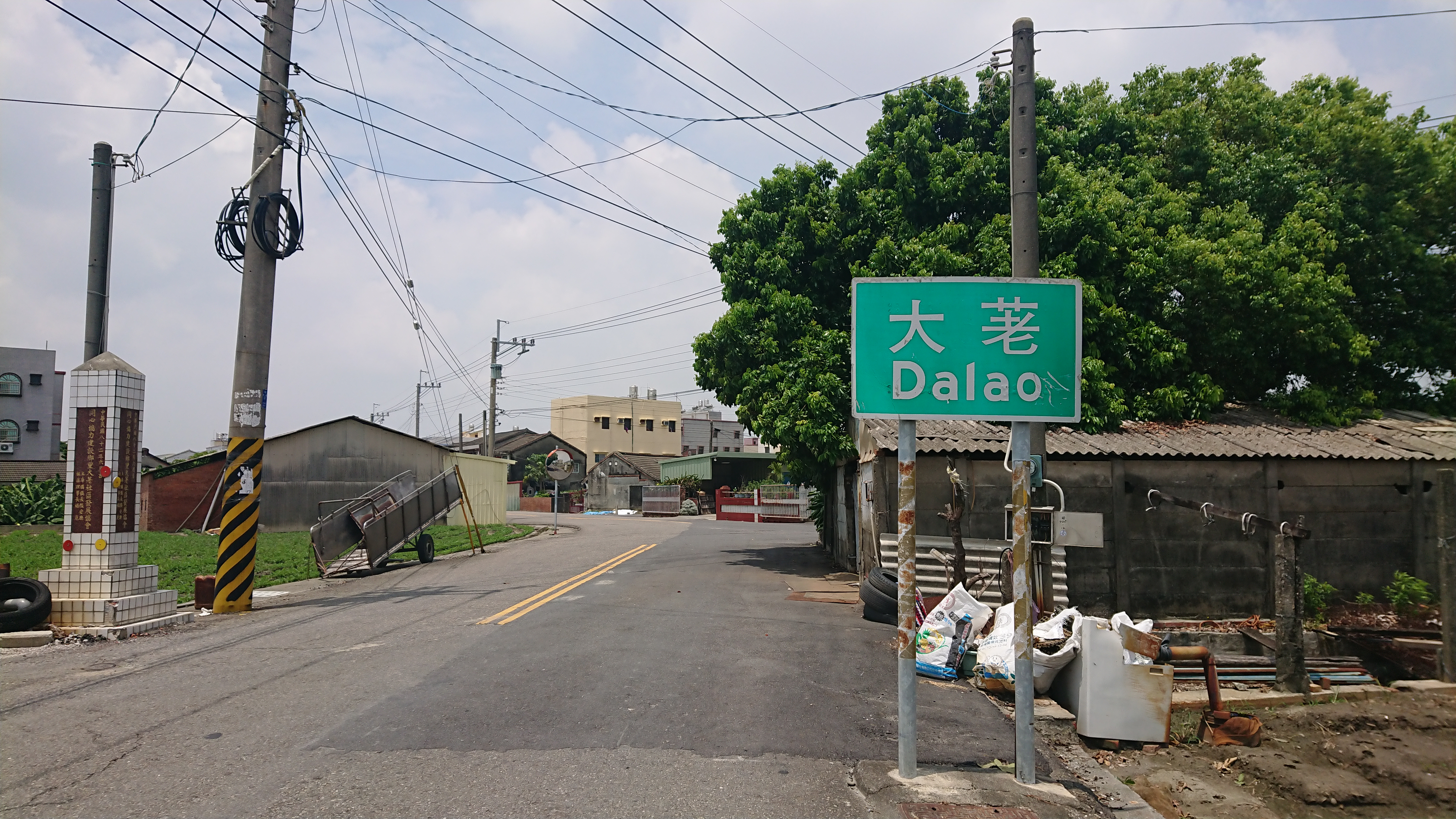 中文（台灣）: 大荖庄地名牌